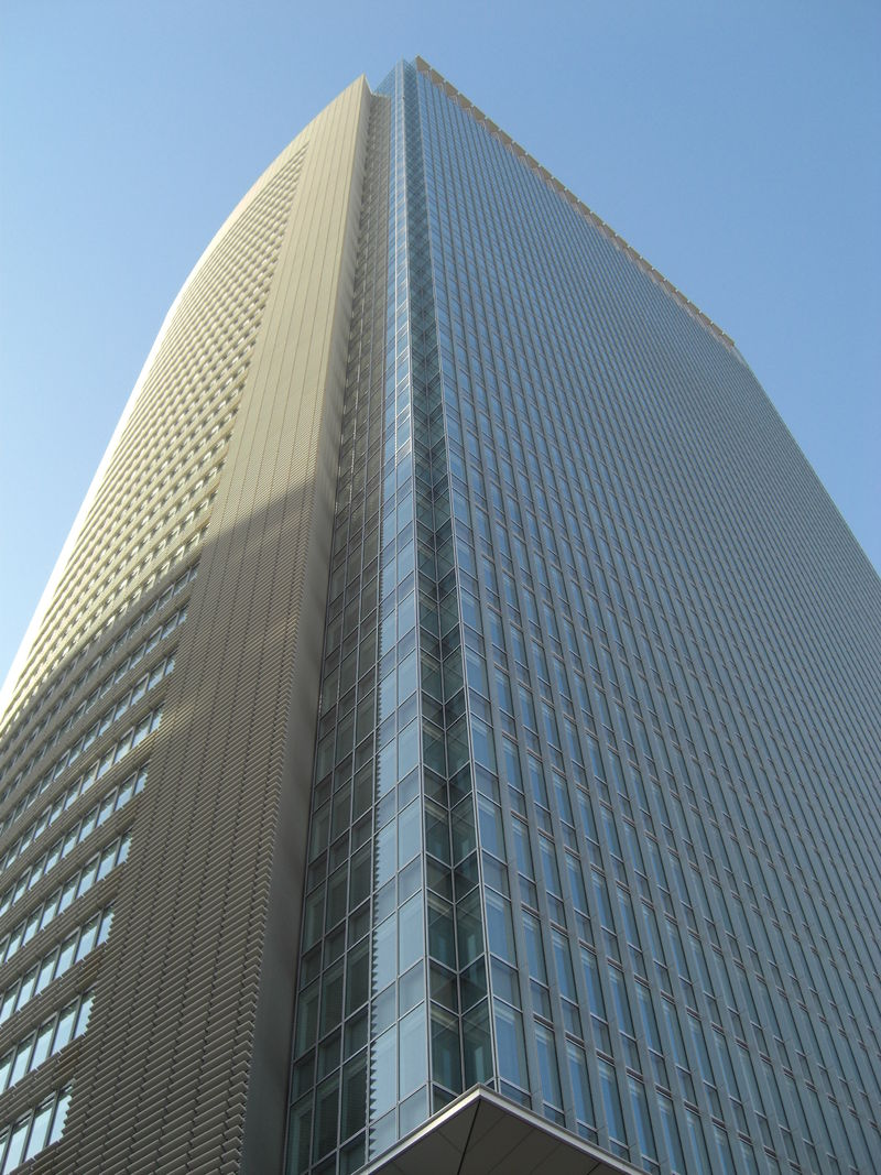 Akasaka Biz Tower